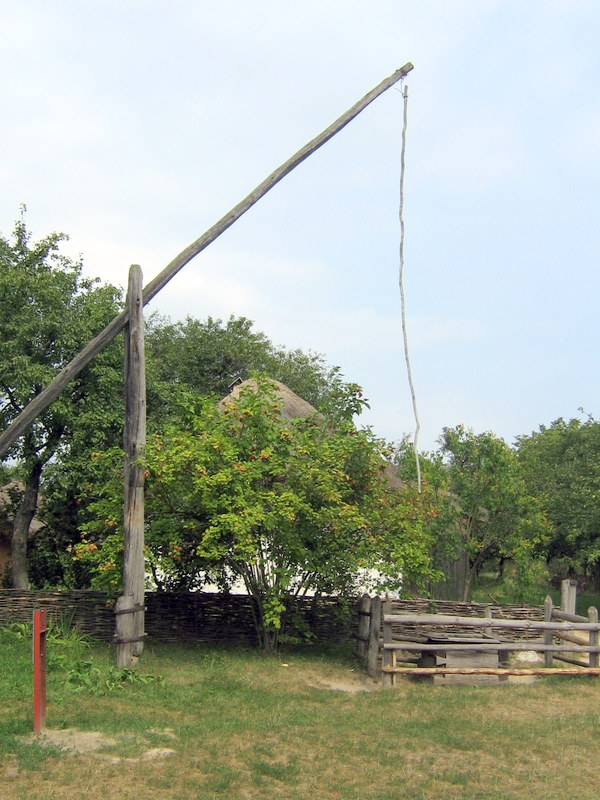 Ђерам у Украјини код Кијева (Пирого́во).